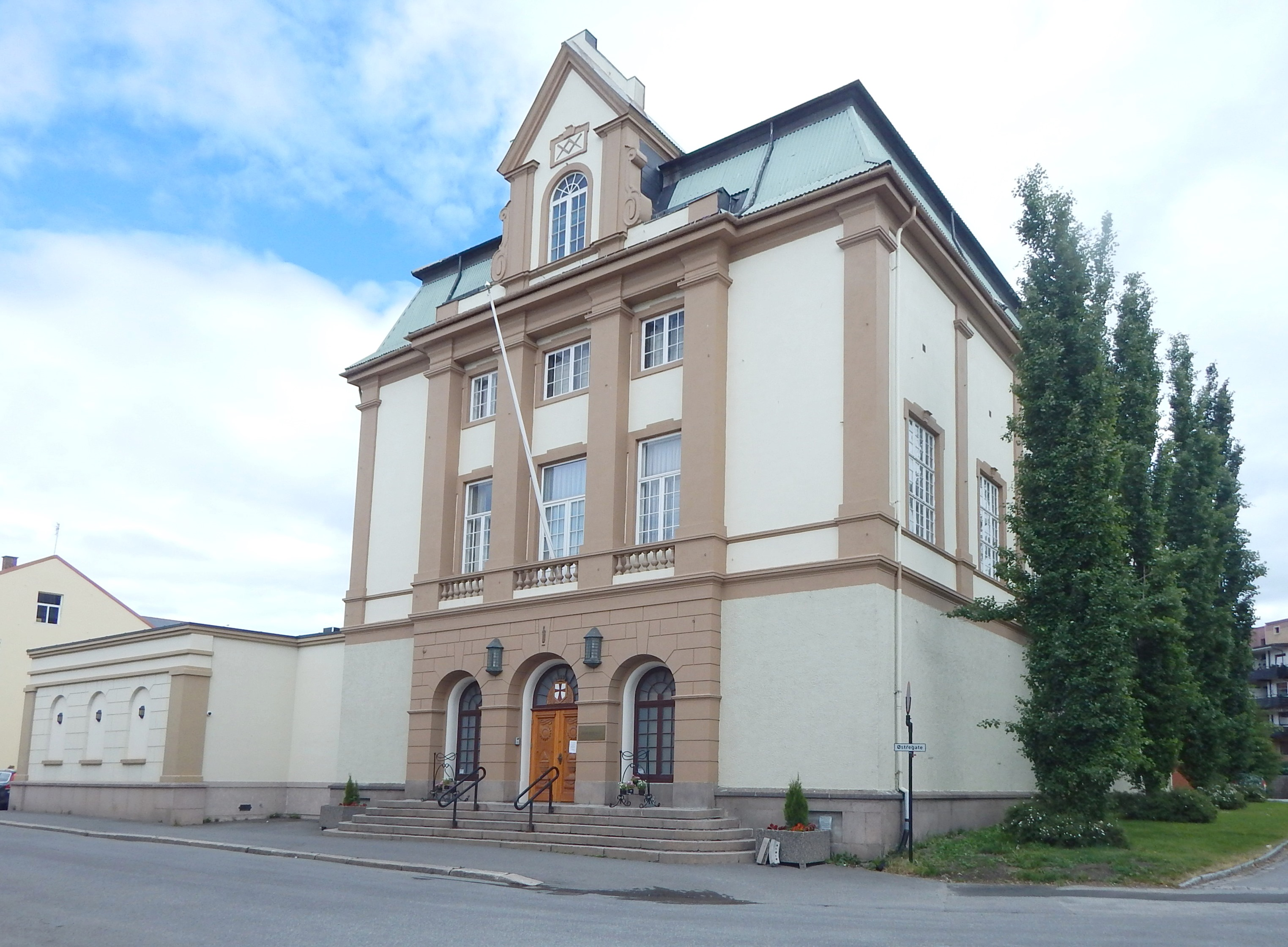 Frimurerlosjen på Hamar